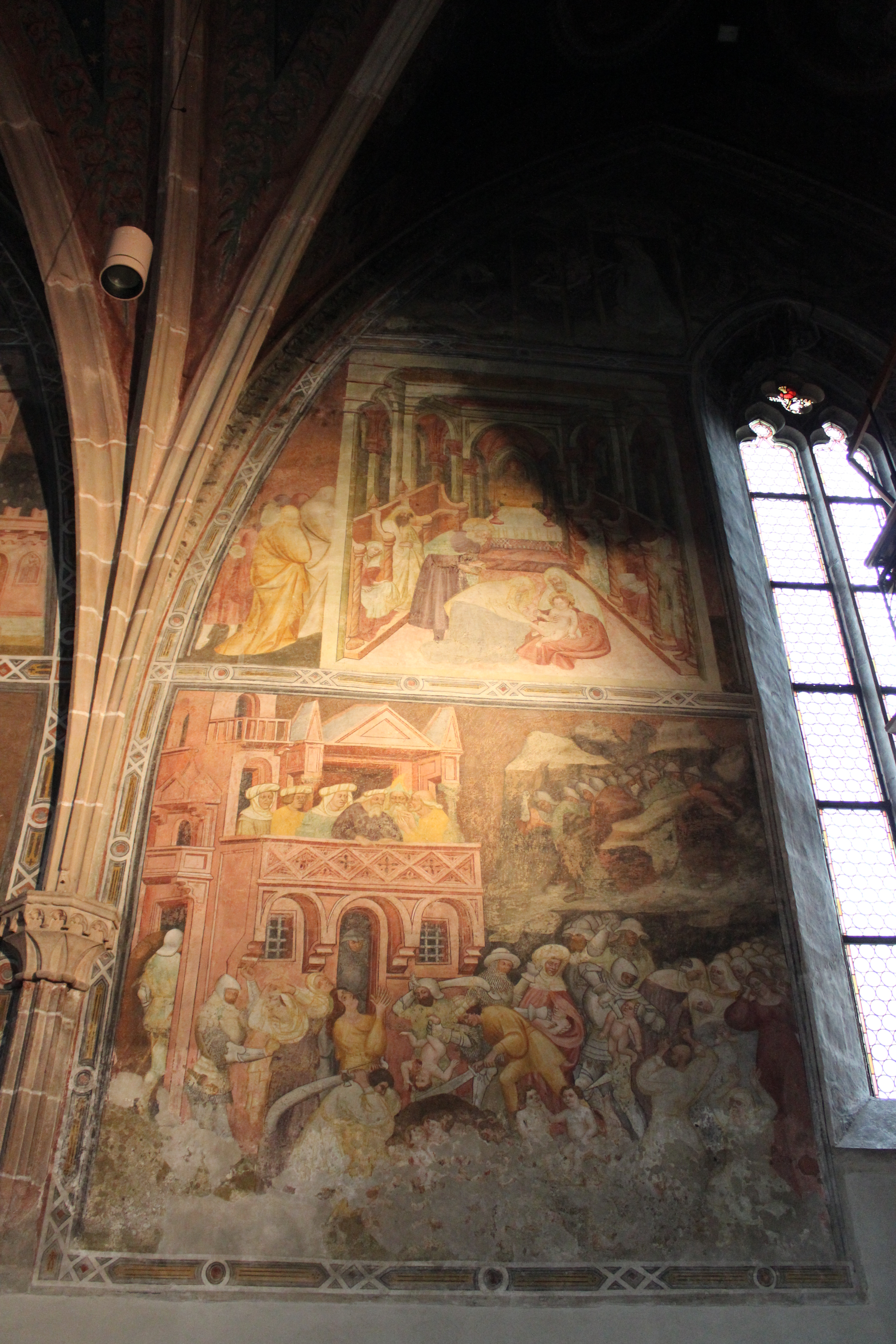 Pfarrkirche Maria Himmelfahrt in Terlan - Fresken (hinten rechts)